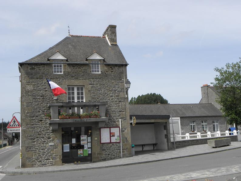 Mairie de Lanhélin (35).